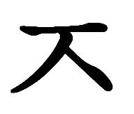 чиыт (хангыль)